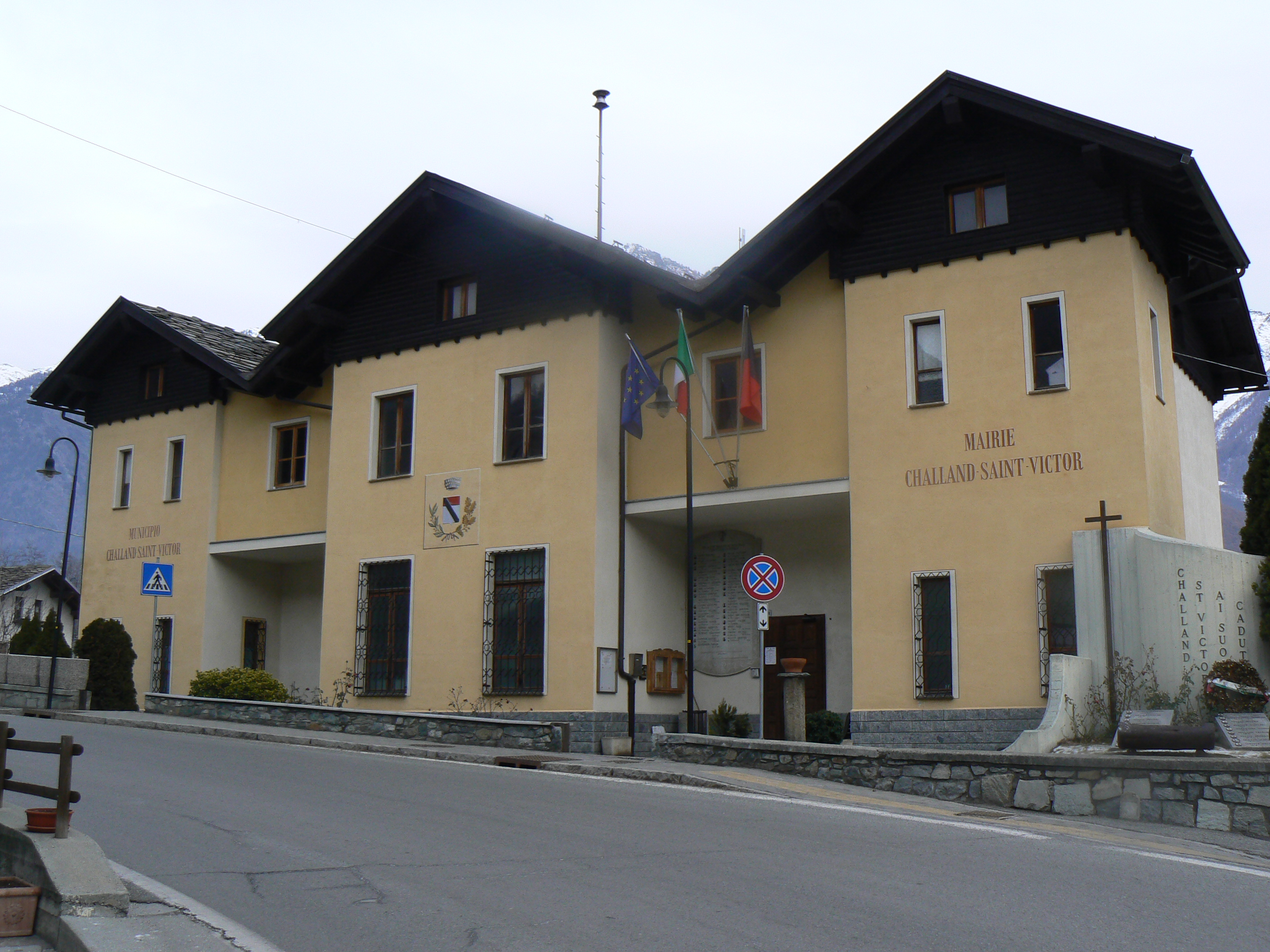 Municipio Challand-Saint-Victor, Valle d'Aosta, Italia.